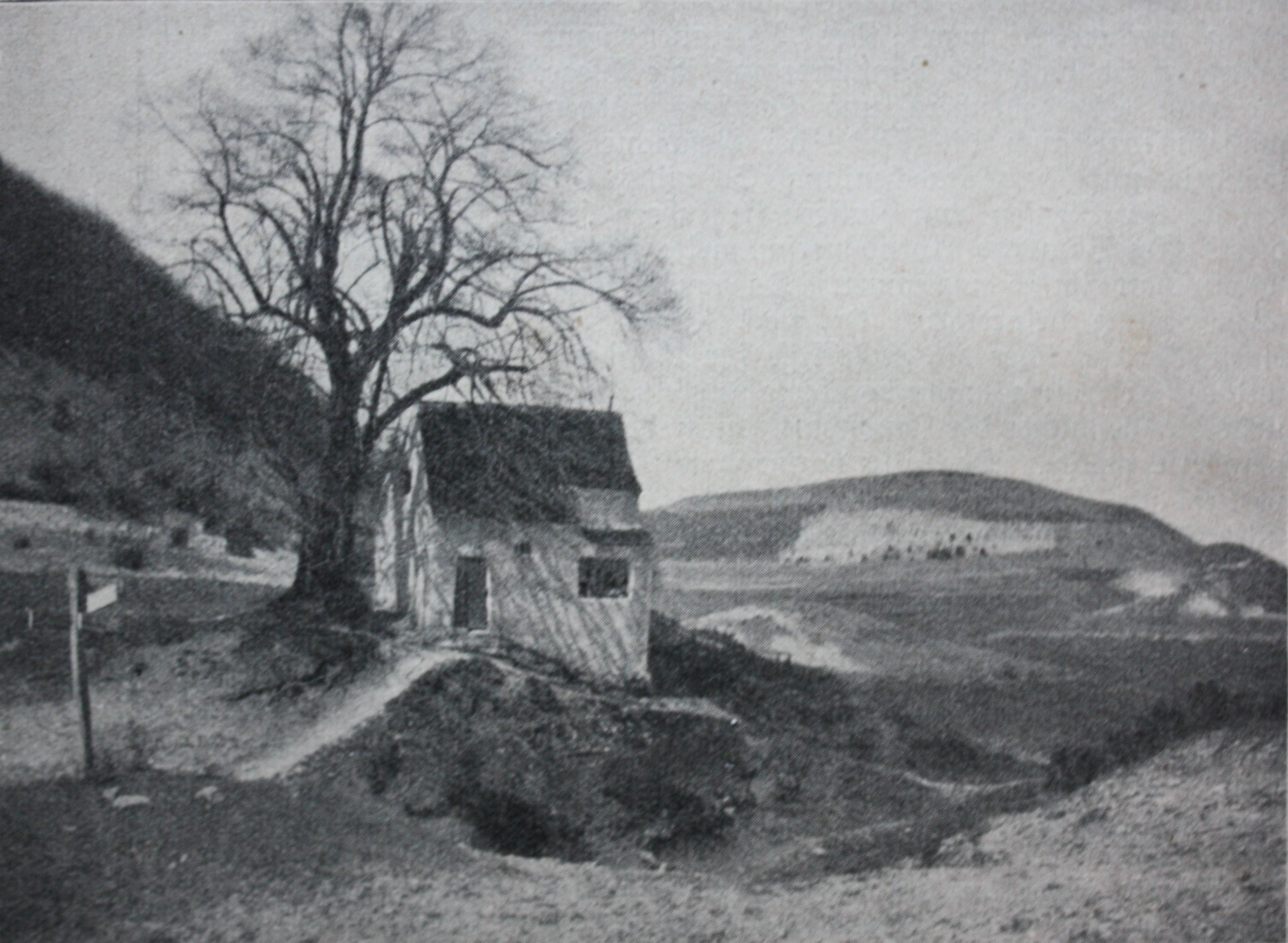 Reiterleskapelle um 1912. Im Hintergrund der im Gegensatz zu heute nur teilweise bewaldete Stuifen.